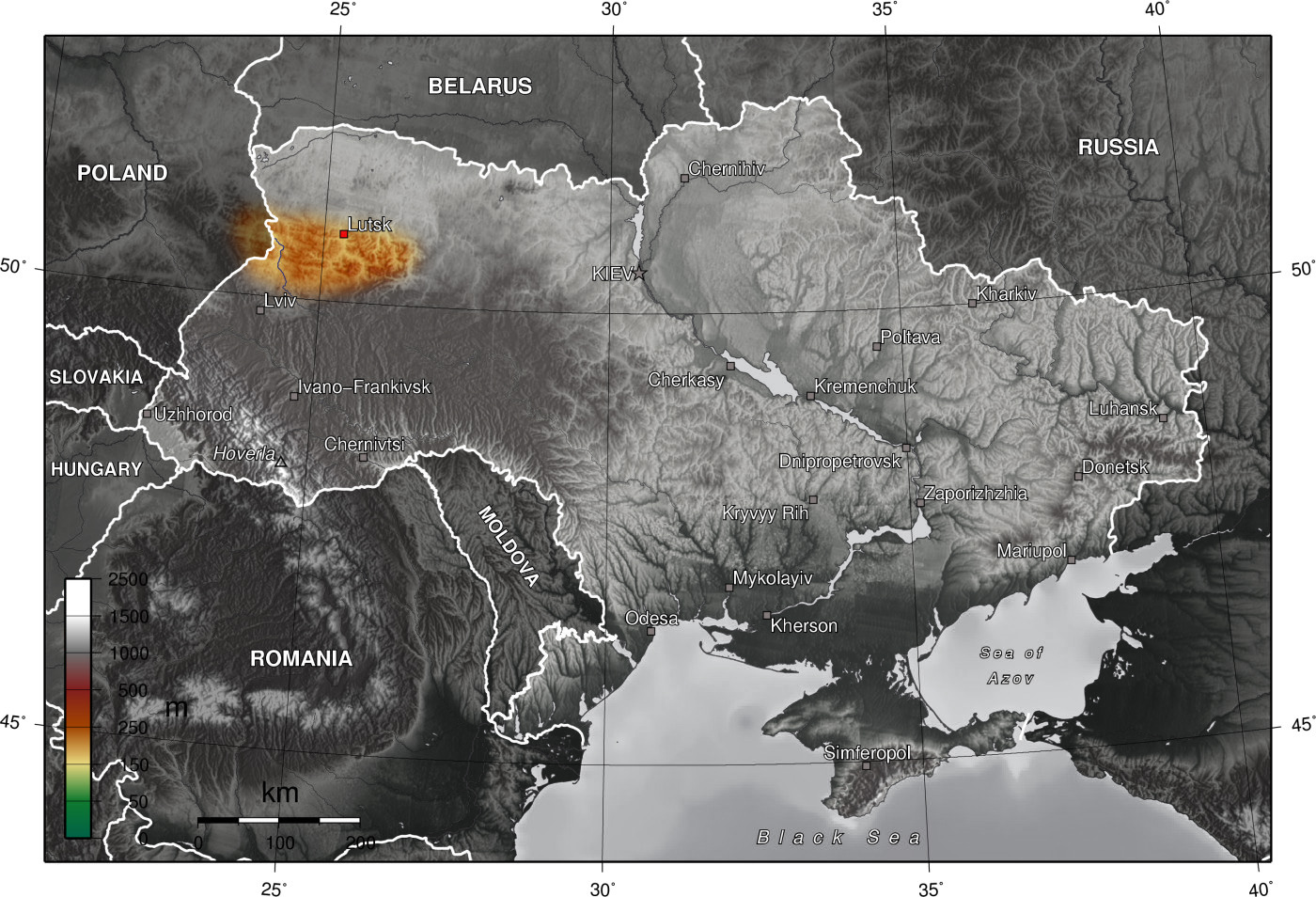 Ukraine_Volin_highland